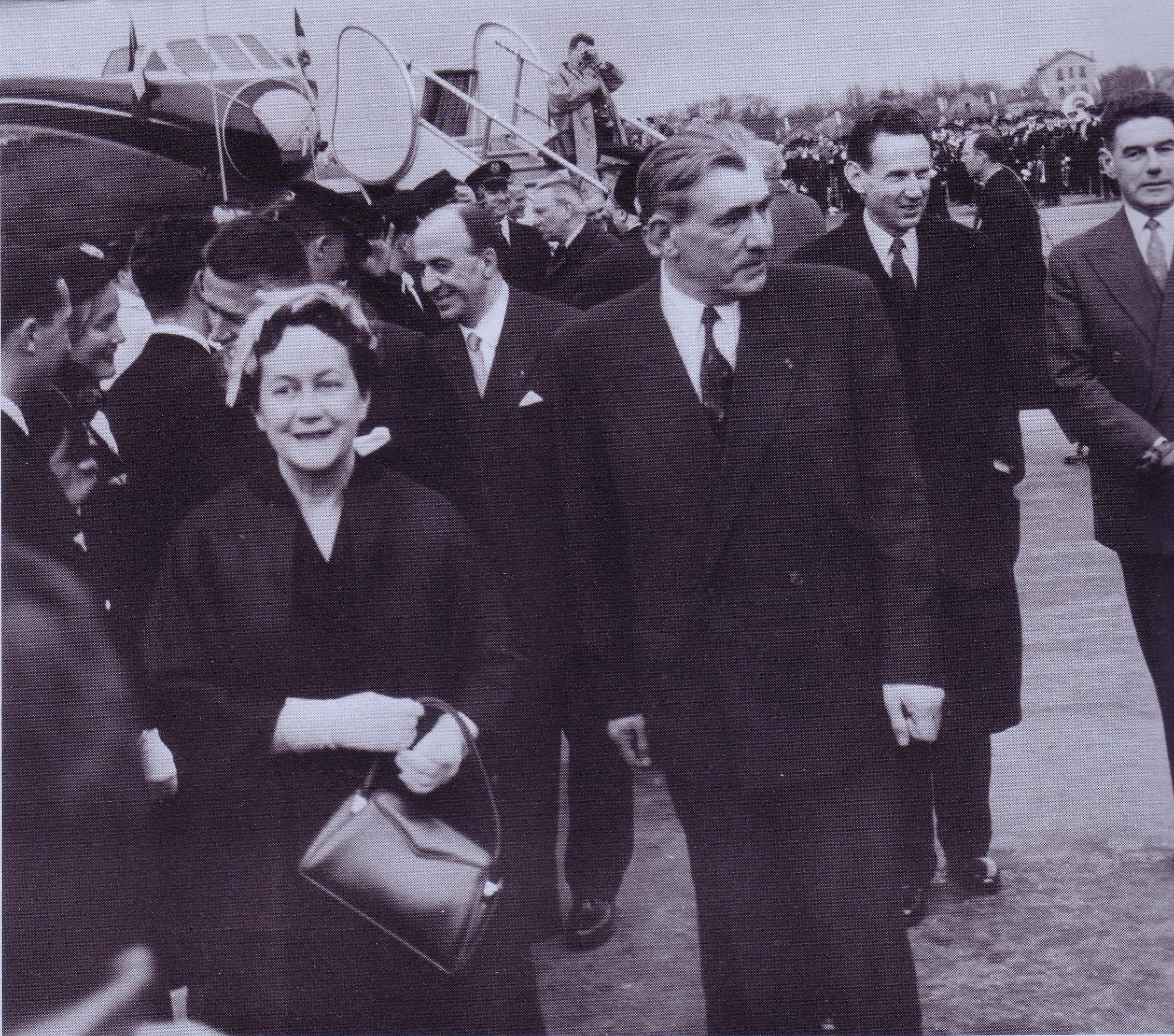 Baptême de la Carvelle "Lorraine" en présence de Mme de Gaulle. De gauche à droite : Mme de Gaulle ; Paul Moroni, alors vice-président d'Air France ; Louis Lesieux, directeur général, à l'arrière-plan ; Max Hymans ; René Brouillet, ambassadeur près le Saint-Siège...